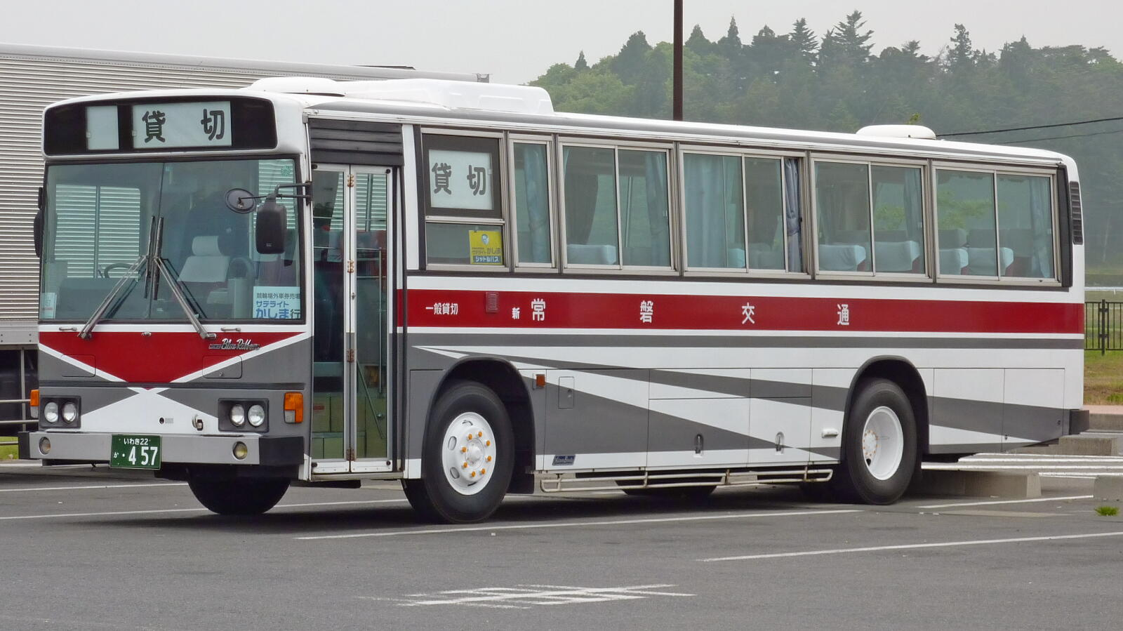 新常磐交通 U-HU2MMAA